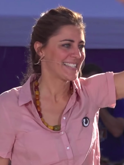 En la concentración en favor de la moción de censura el 20 de Mayo en la Puerta del Sol.